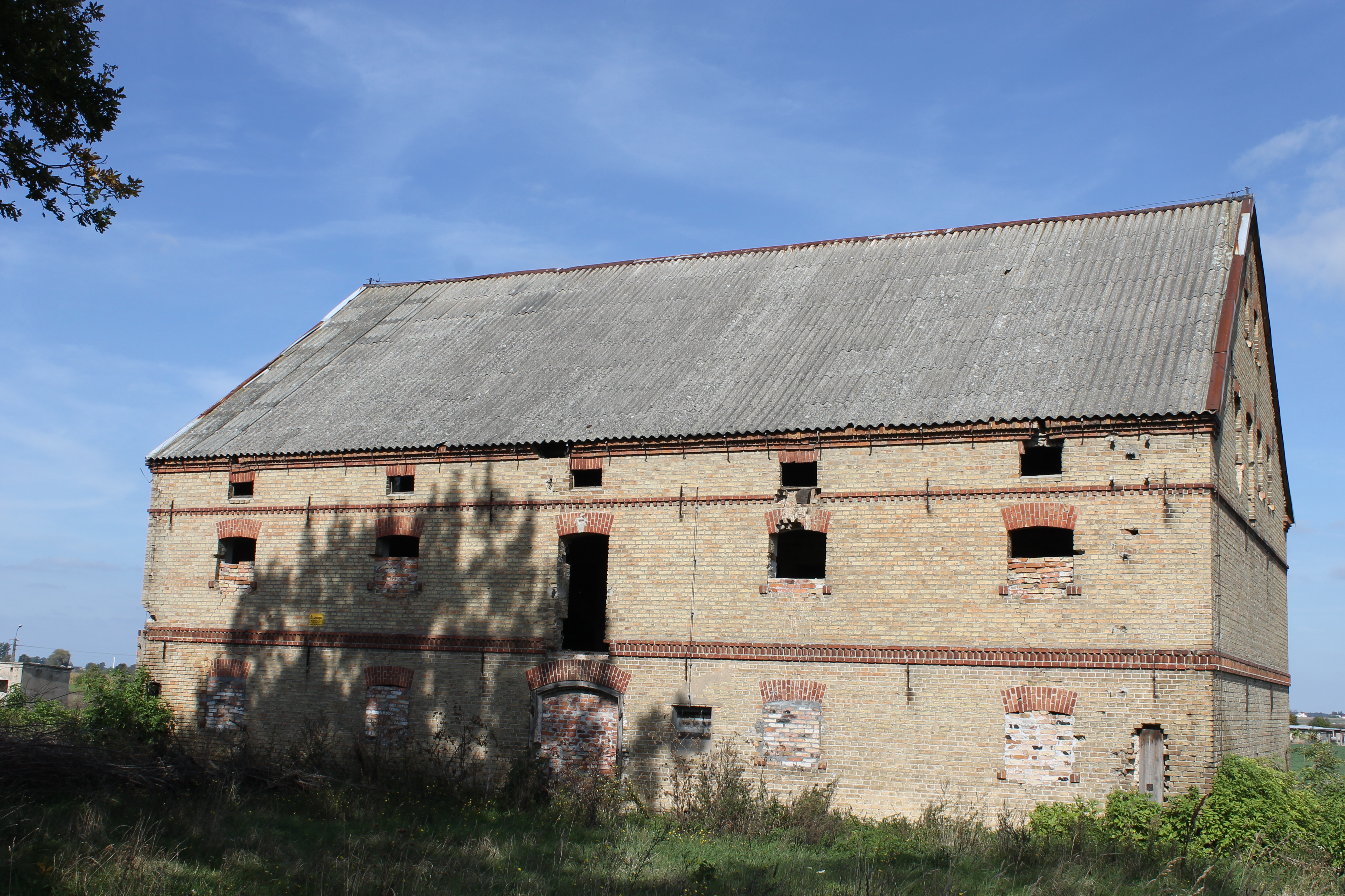 Dobiesławice, owczarnia, 2 poł. XIX